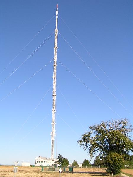 L'émetteur de Niort-Maisonnay, Deux-Sèvres, France.